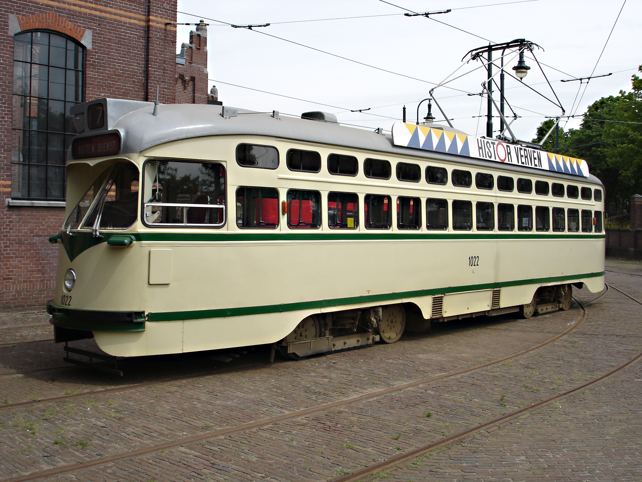 PCC in de remise Frans Halsstraat, Den Haag